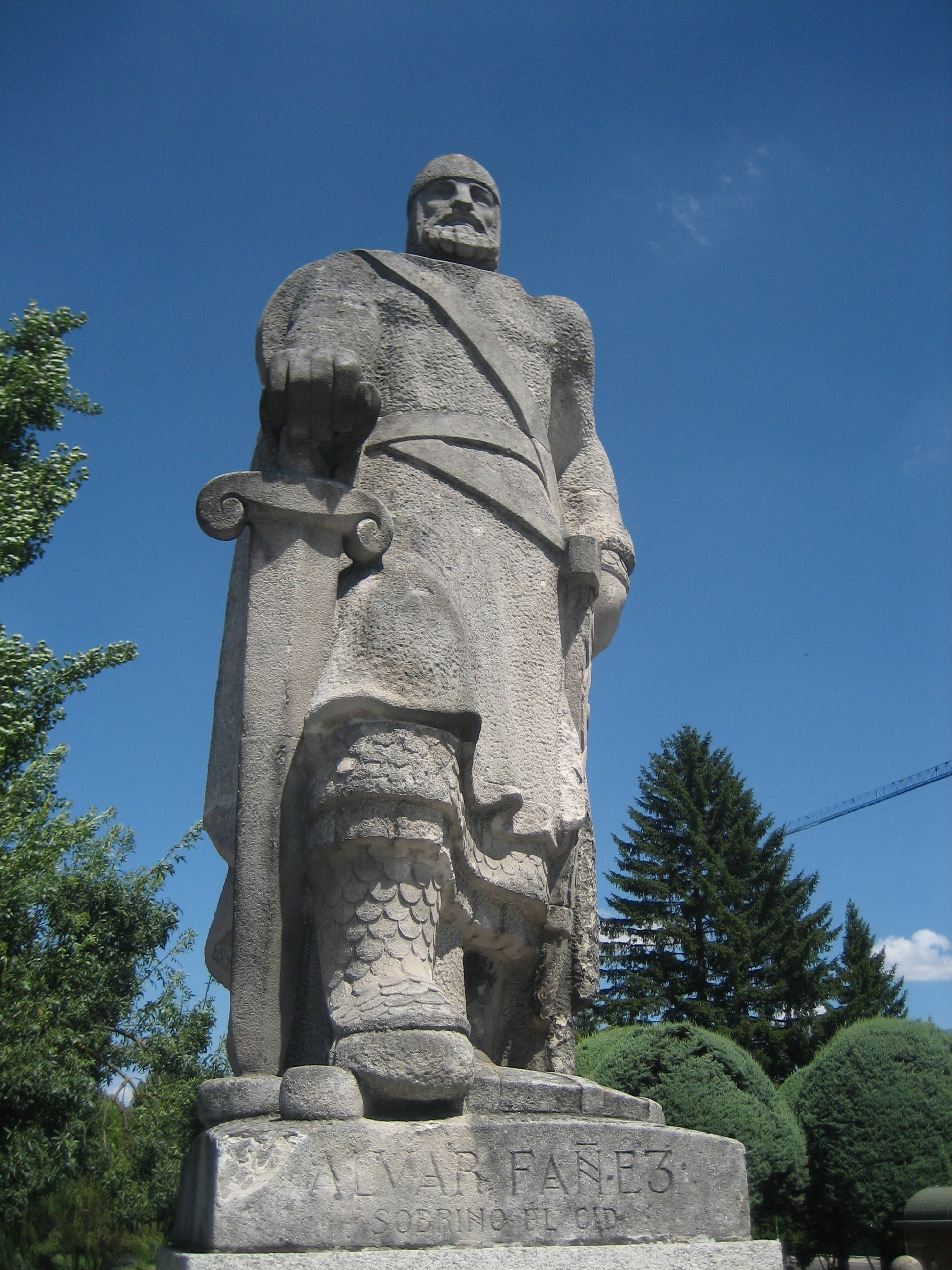 Estatua de Álvar Fáñez, obra de Joaquín de Lucarini